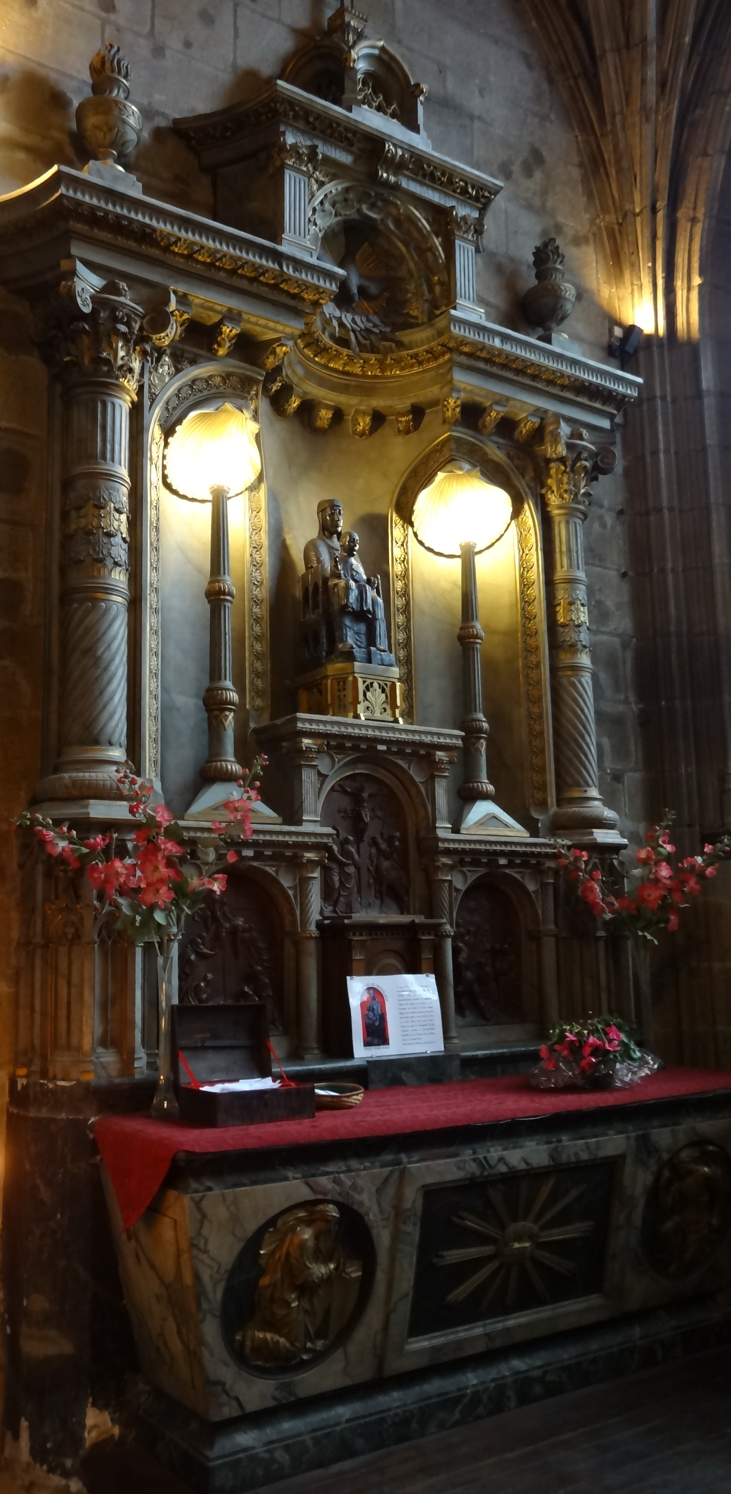 Statue de la Vierge noire (XII siècle); la mort de la Vierge bas-relief; Moulins Cathédrale